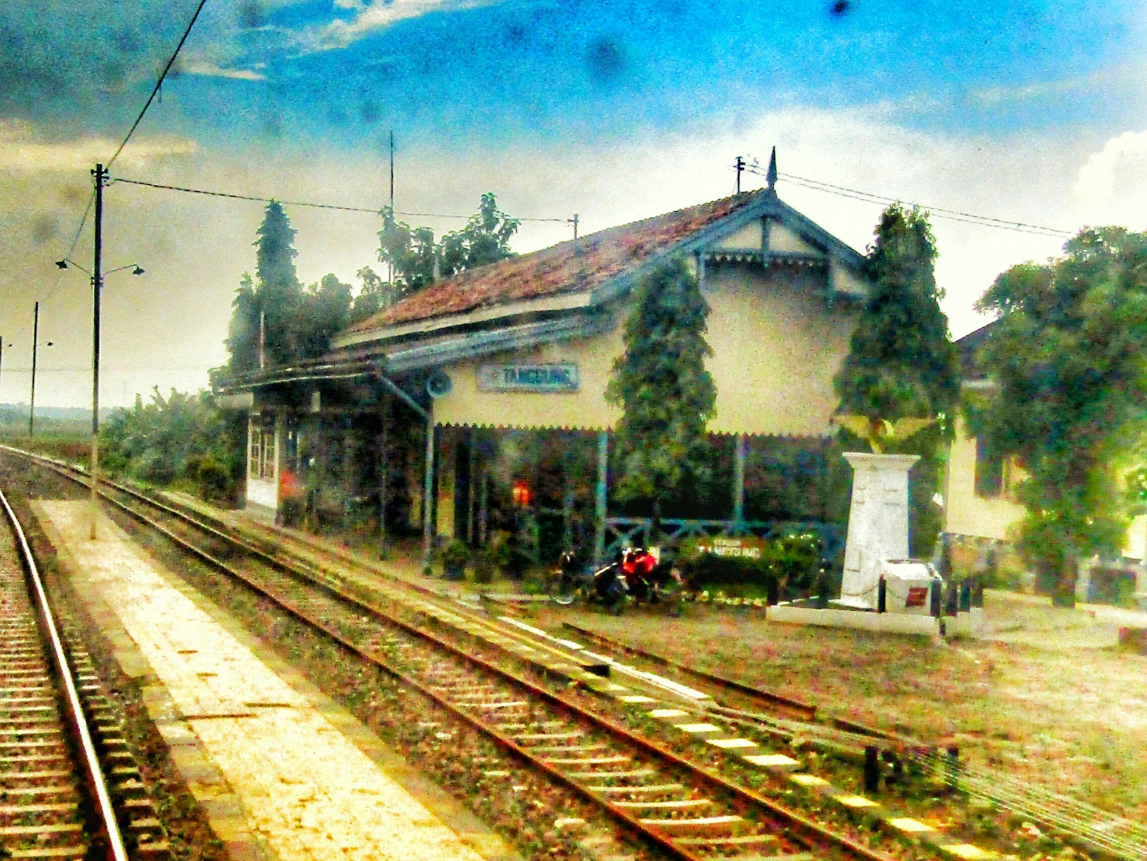 Stasiun Tanggung, 2019